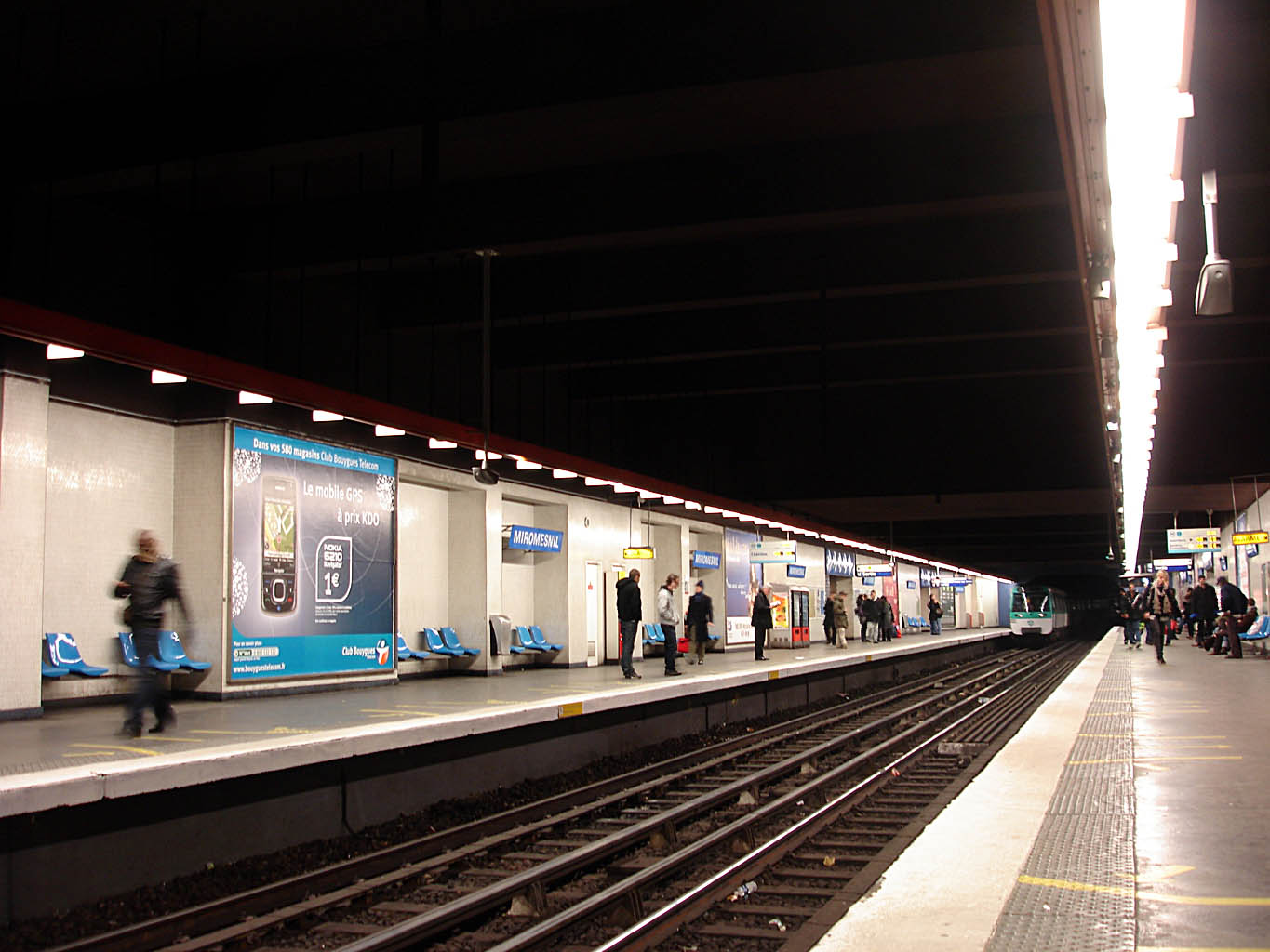 Station Miromesnil de la ligne 13 du métro de Paris, France.